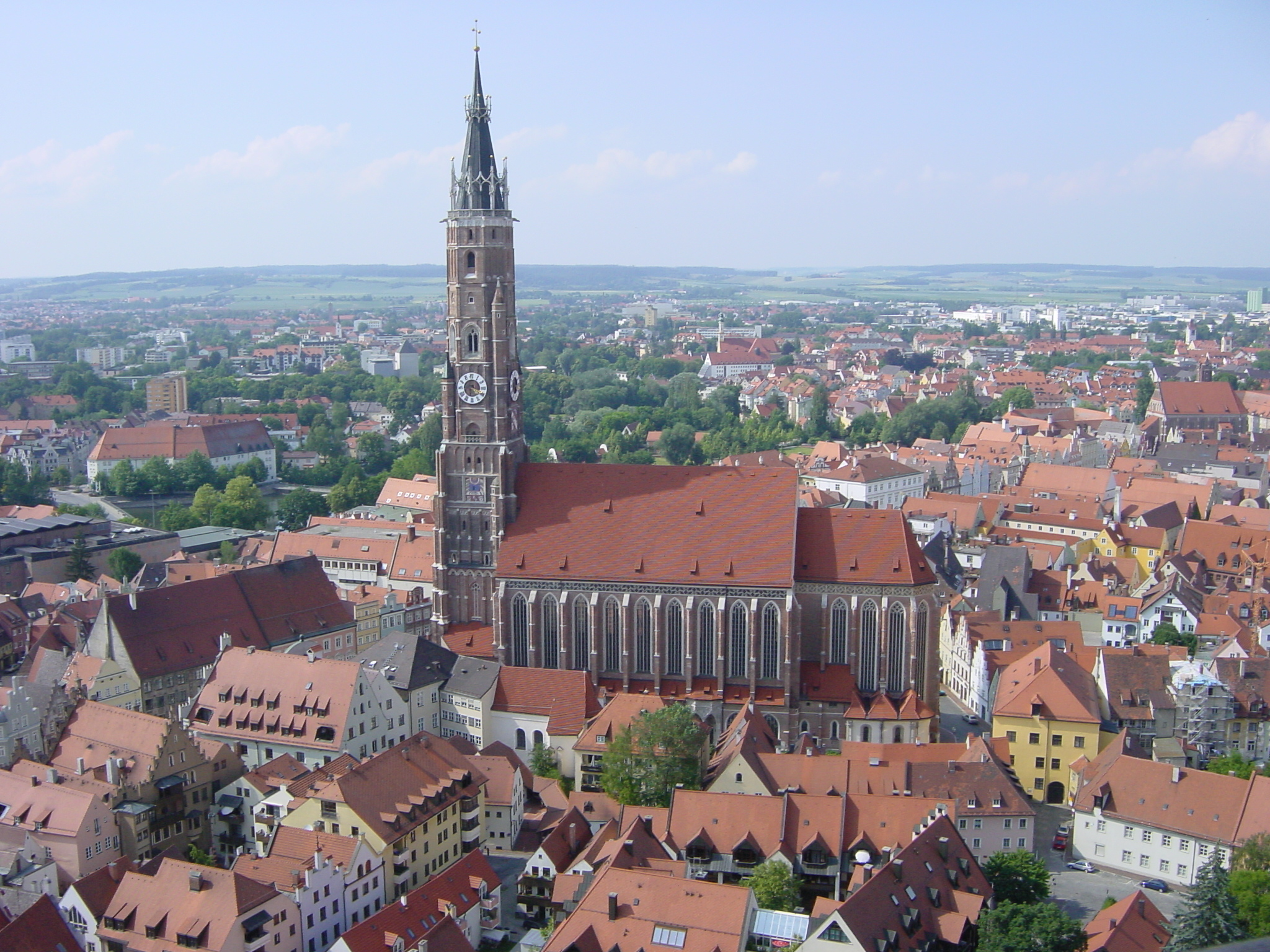 2003-06-09 Landshut 048